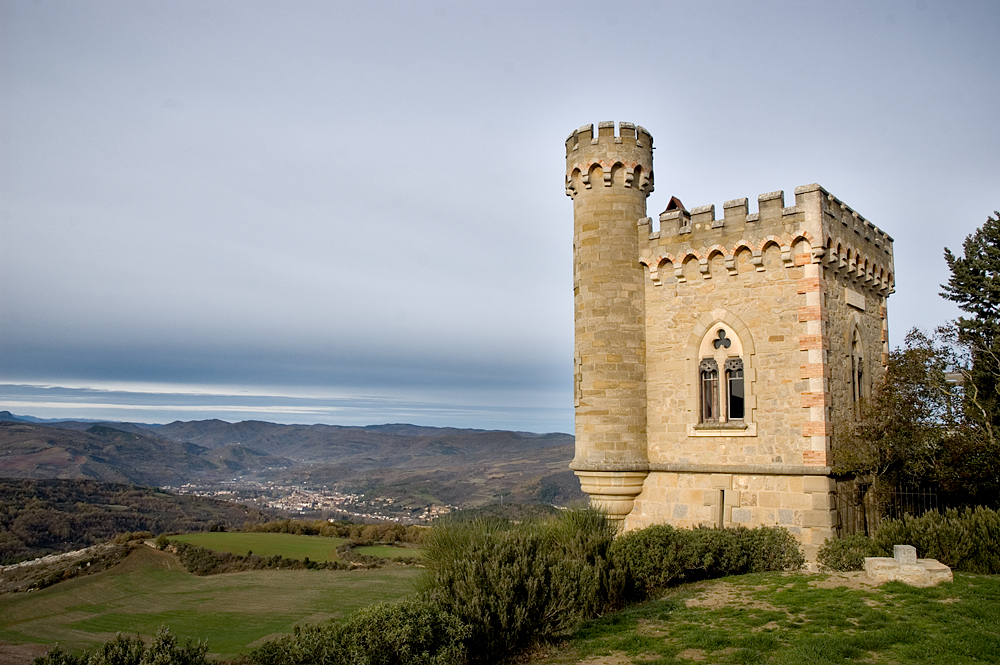 Castillo de Rennes-le-Château (Francia)